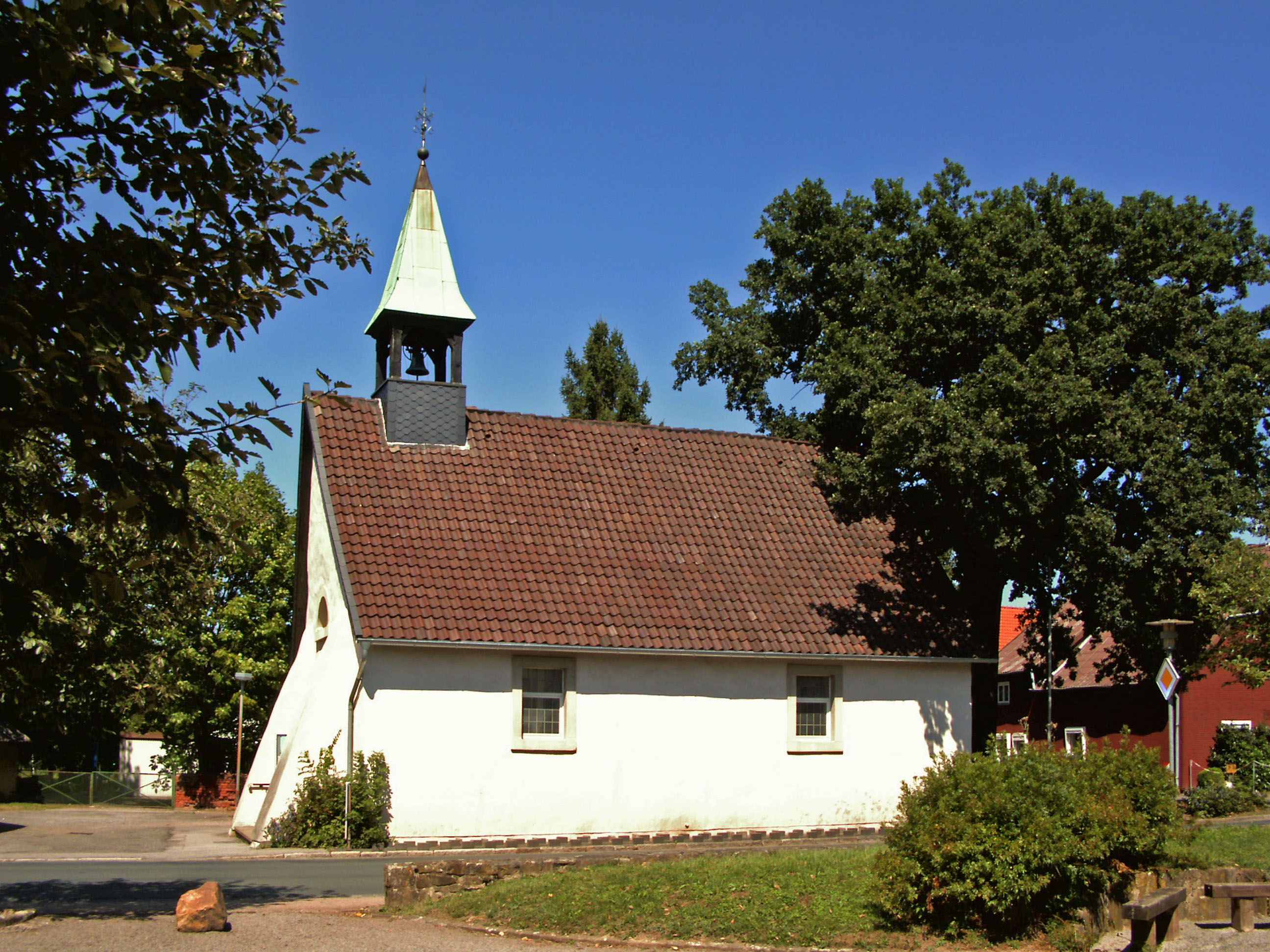 Evangelische Kapelle in Langreder bei Hannover.